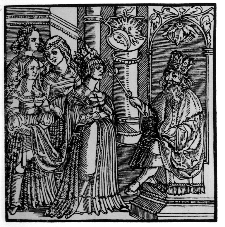 Беларуская (тарашкевіца): «Эстэр перад Асвэрам». Гравюра з «Кнігі Астэр». Выданьне Францішка Скарыны. 1517-19.